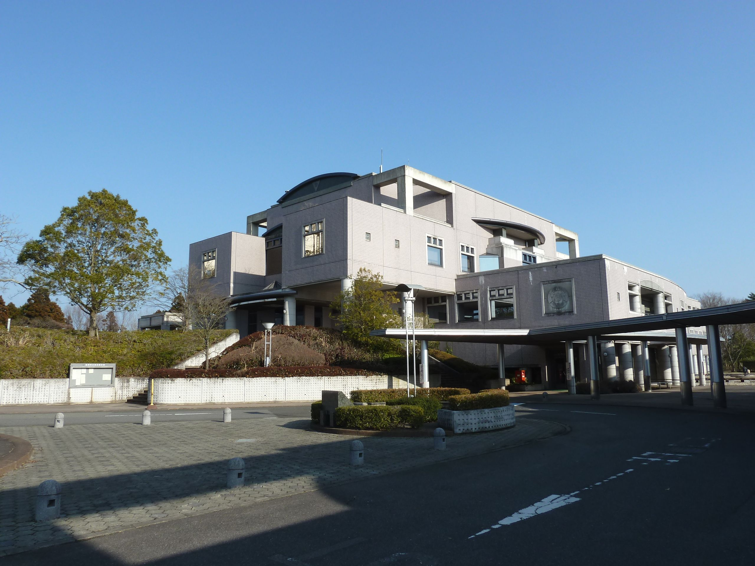 富岡町役場